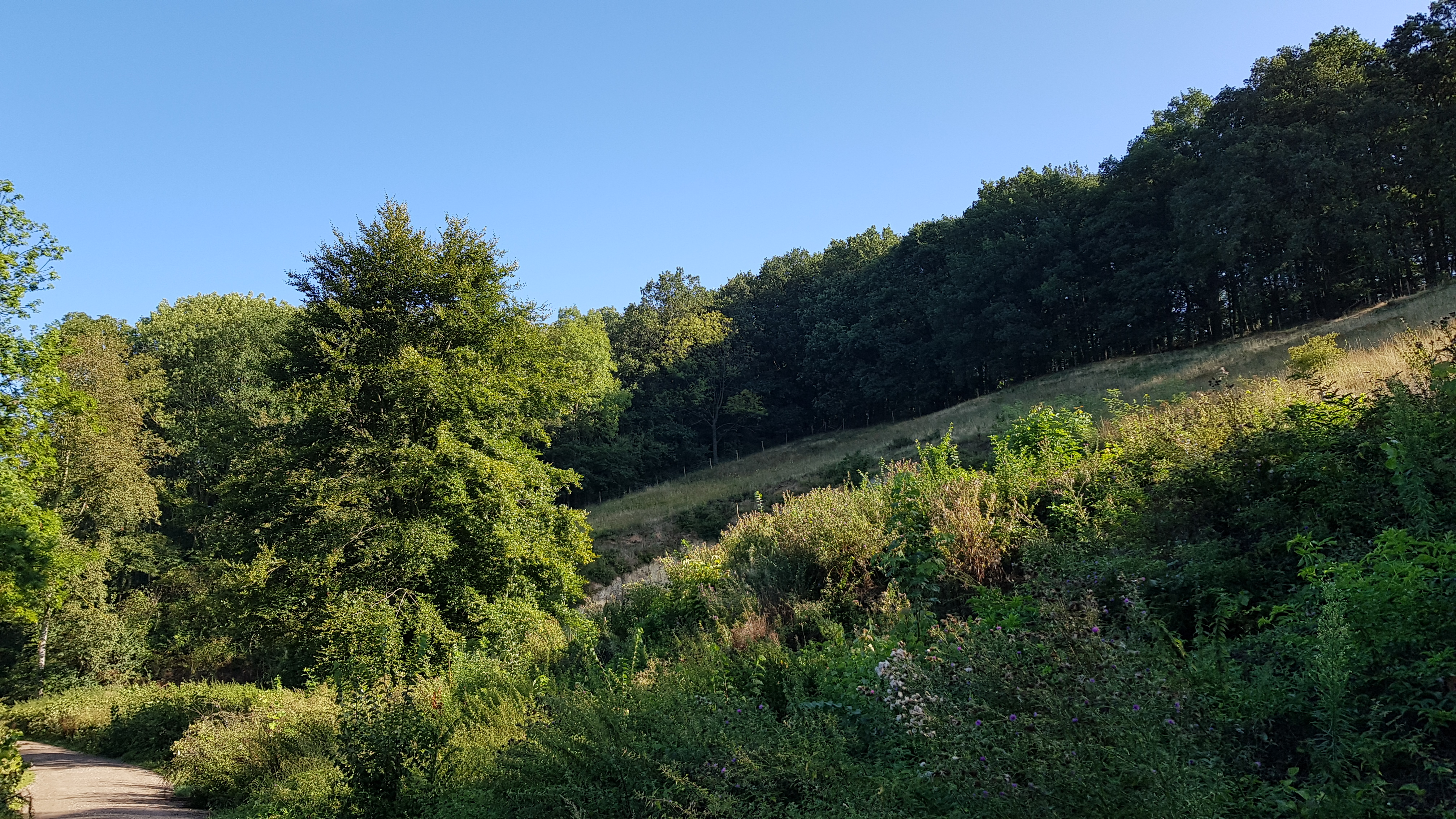 Koeberggroeve, Cadier en Keer, Nederland